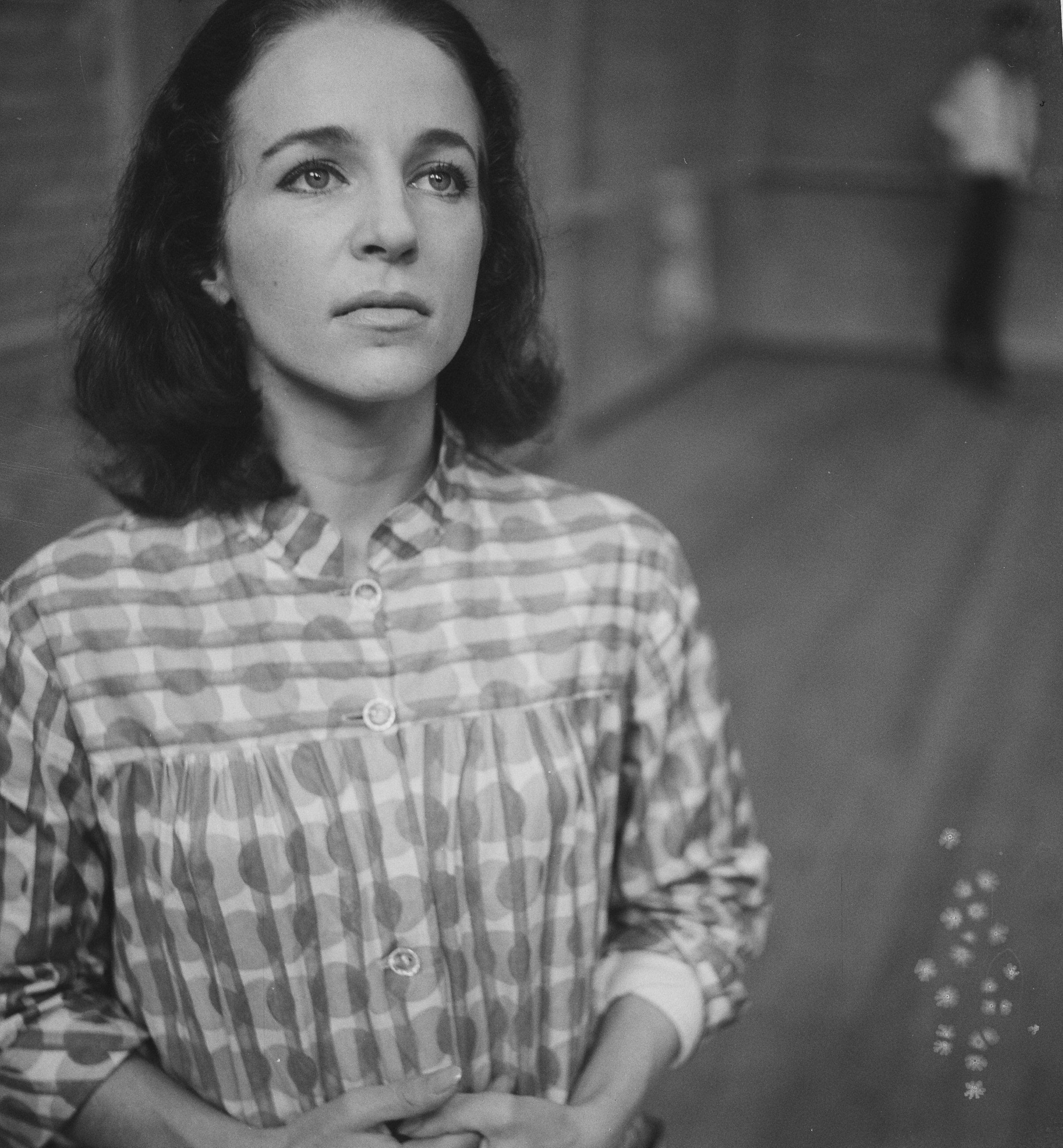 Collectie / Archief : Fotocollectie Anefo Reportage / Serie : [ onbekend ] Beschrijving : Opdracht Telegraaf: portret Marianne Hilarides Datum : 16 oktober 1961 Trefwoorden : portretten Persoonsnaam : Hilarides, Marianne Fotograaf : Nijs, Jac. de / Anefo Auteursrechthebbende : Nationaal Archief Materiaalsoort : Negatief (zwart/wit) Nummer archiefinventaris : bekijk toegang 2.24.01.03 Bestanddeelnummer : 913-0565